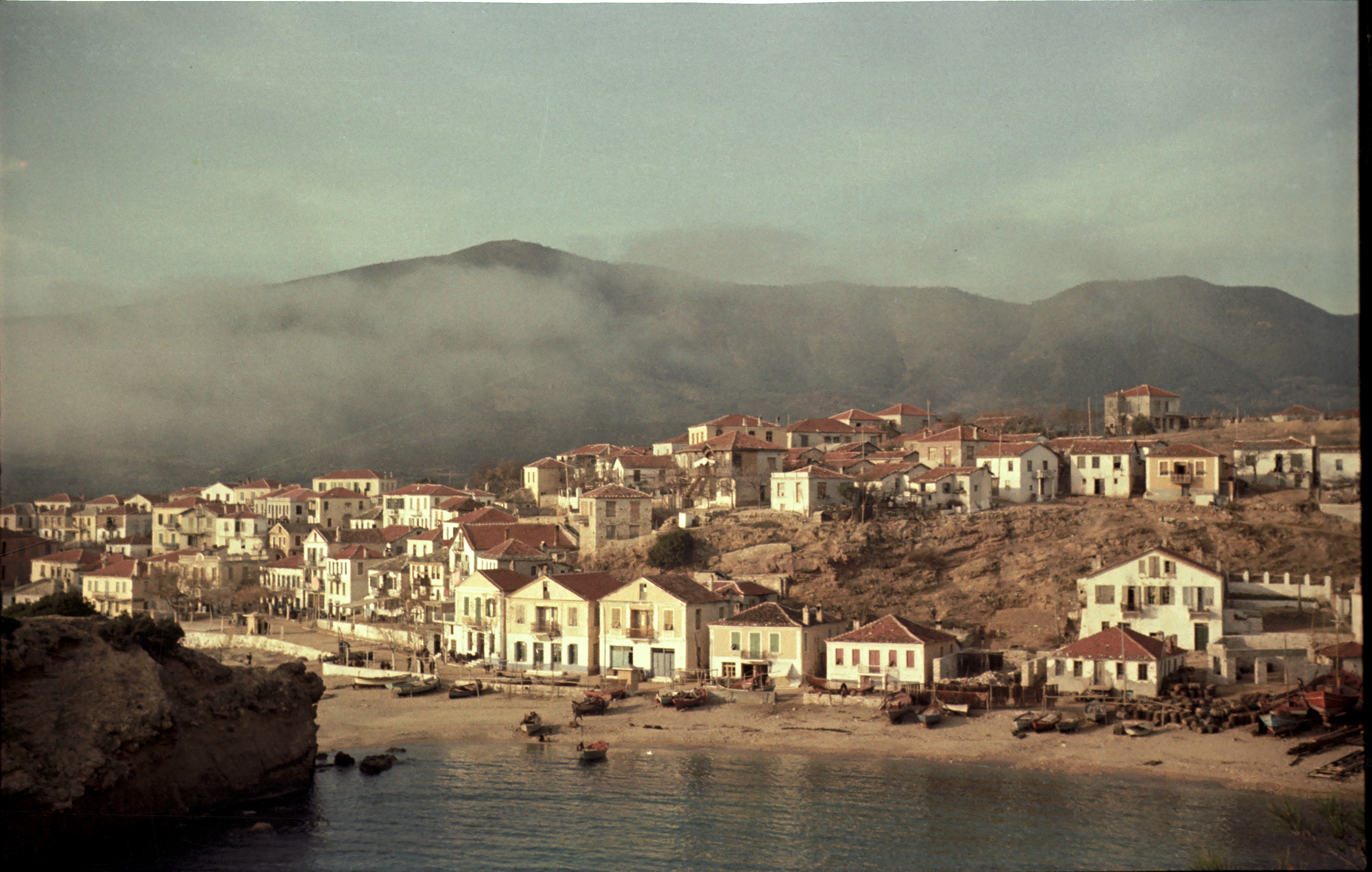 Parelia am Fischerhafen